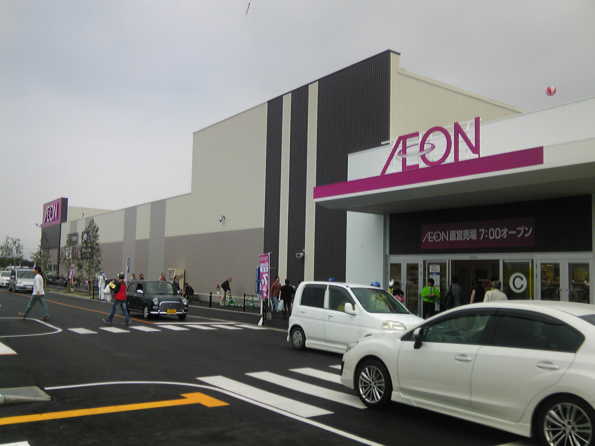 イオン小郡店 店舗入口（福岡県小郡市）